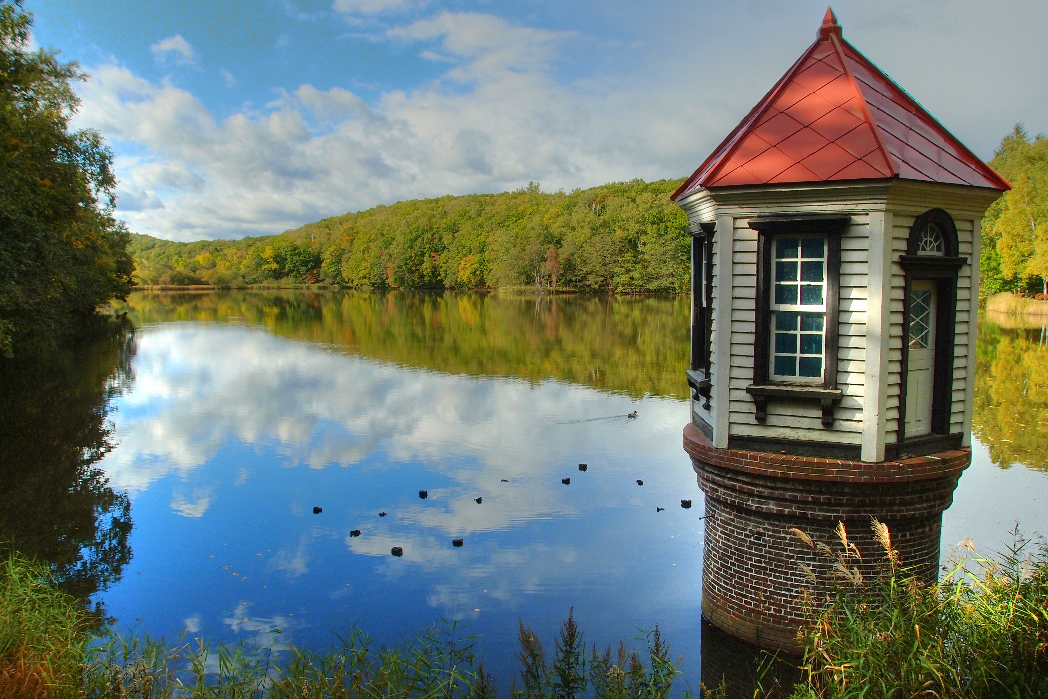 西岡公園（Nishioka park）